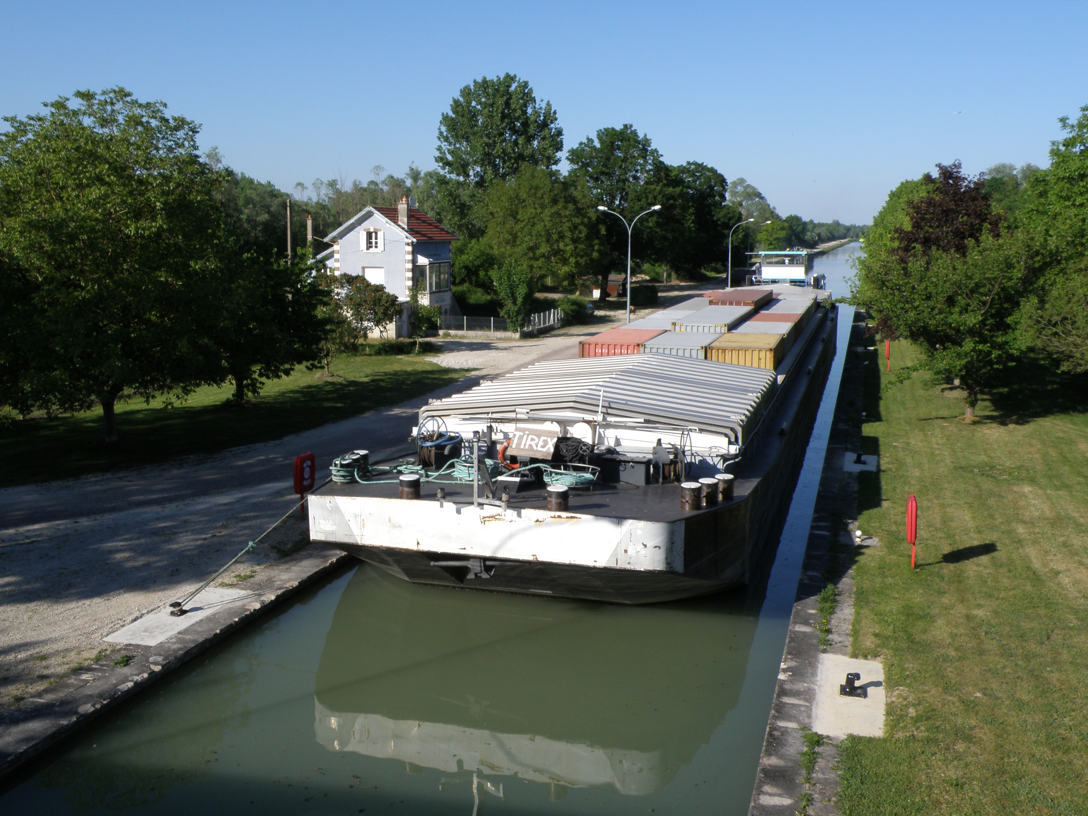 Ecluse de Melz. 77171 Melz-sur-Seine